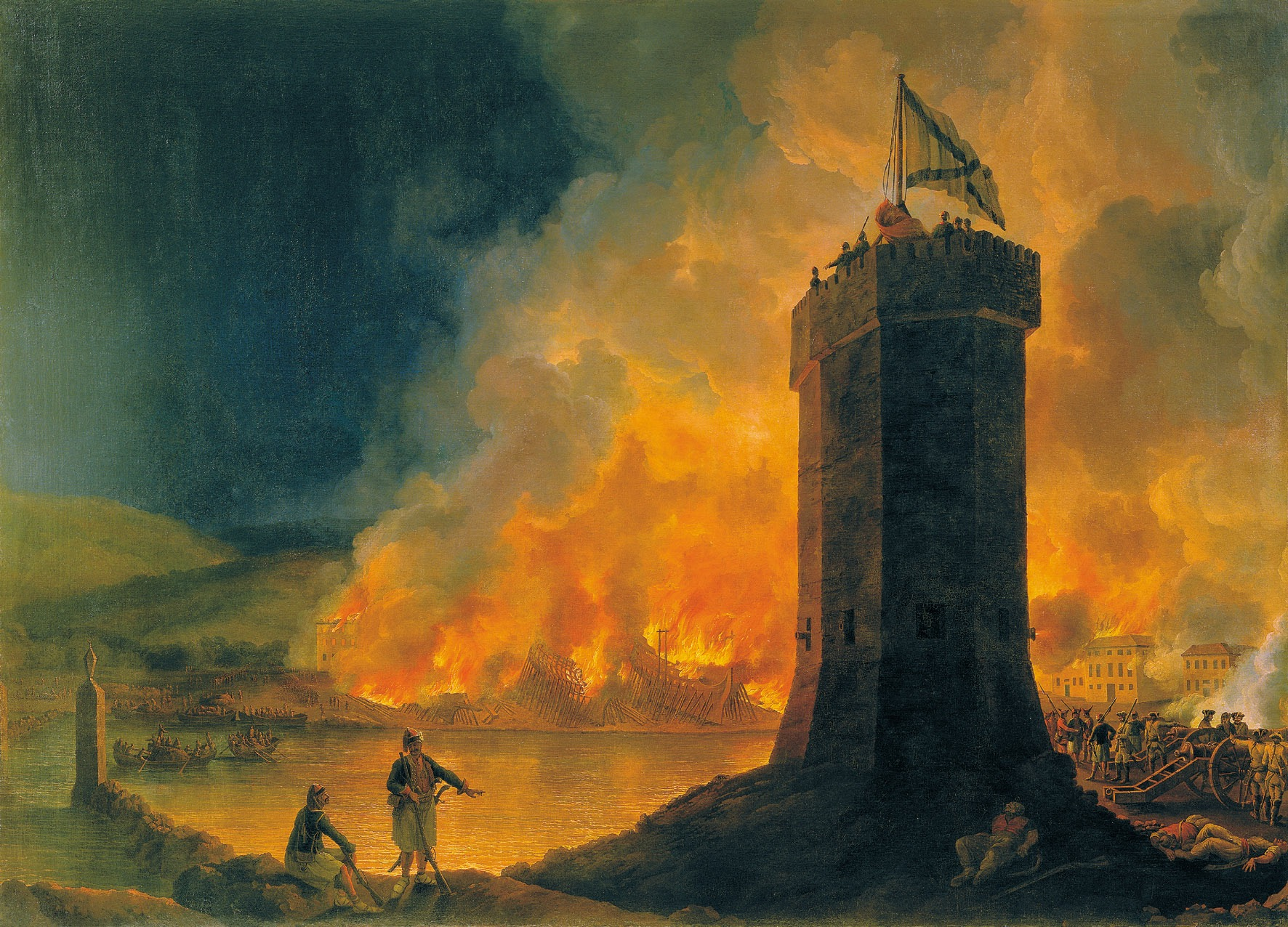 Это картина немецкого художника Якоба Филиппа Гаккерта «Сожжение турецкого флота в Митиленской гавани 2 ноября 1771 года». Картина написана специально для Чесменского зала Большого Петергофского дворца в 1775 году. На картине описан эпизод русско-турецкой войны 1768-1774 годов — атака русского флота на гавань Митилены 2(13)ноября 1771 года. На переднем плане — сторожевая восьмиугольная башня Митиленской гавани со спущенным турецким и развевающимся Андреевским флагом. На башне — русские матросы, у подножия башни — тела мертых турок, левее — фигуры двух воинов-греков. На втором плане слева, между маяками гавани и у берега,—русские шлюпки с войсками десанта; справа, у края картины,—пехотинцы, продолжающие стрелять по крепостным сооружениям. На заднем плане — горящие на стапелях турецкие недостроенные суда и охваченные пожаром здания Адмиралтейства, рядом — готовящиеся к отплытию русские войска.